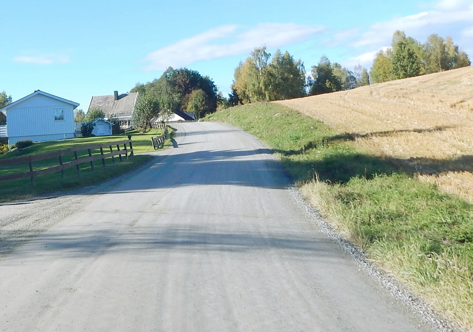 Kurudvegen i Vang